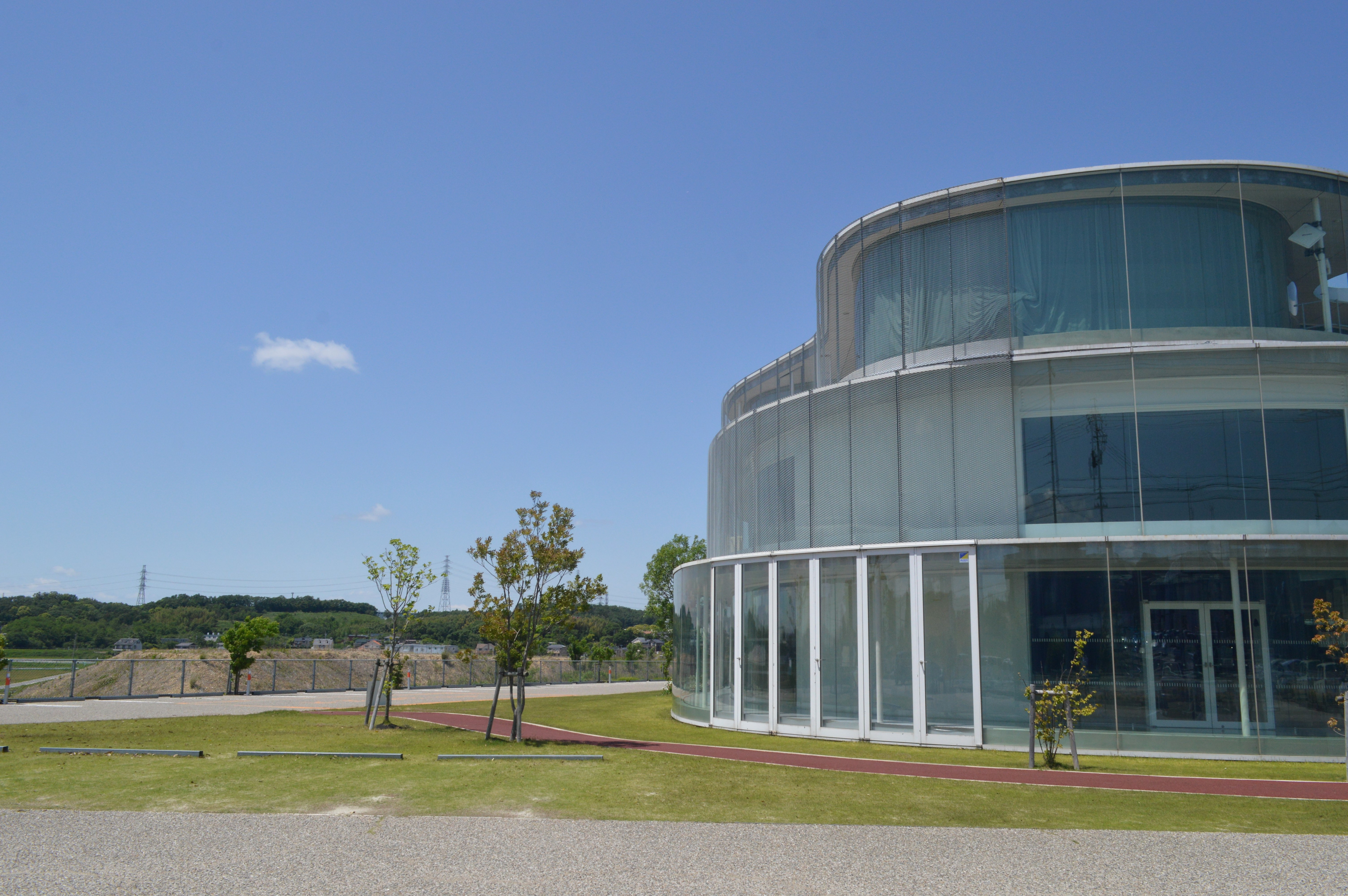 愛知県豊田市にある逢妻交流館。